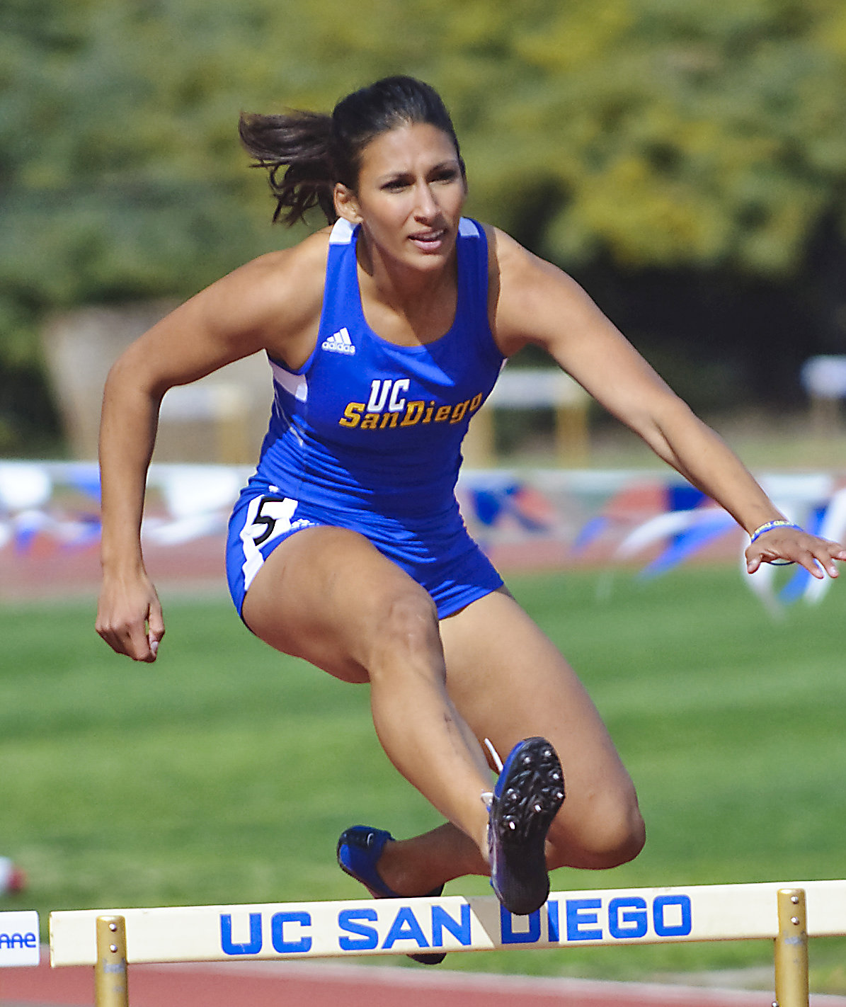 Christine Merrill March 2010 San Diego UCSD Tritons Track Hurdles Hurdling NCAA Division 2